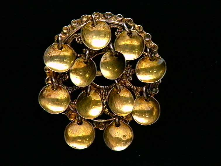 Rosesølje med hengende løv i forgylt sølv, innkjøpt i 1896 i Nissedal i Telemark. Foto Anne-Lise Reinsfelt / Norsk Folkemuseum, NF.1896-0416.